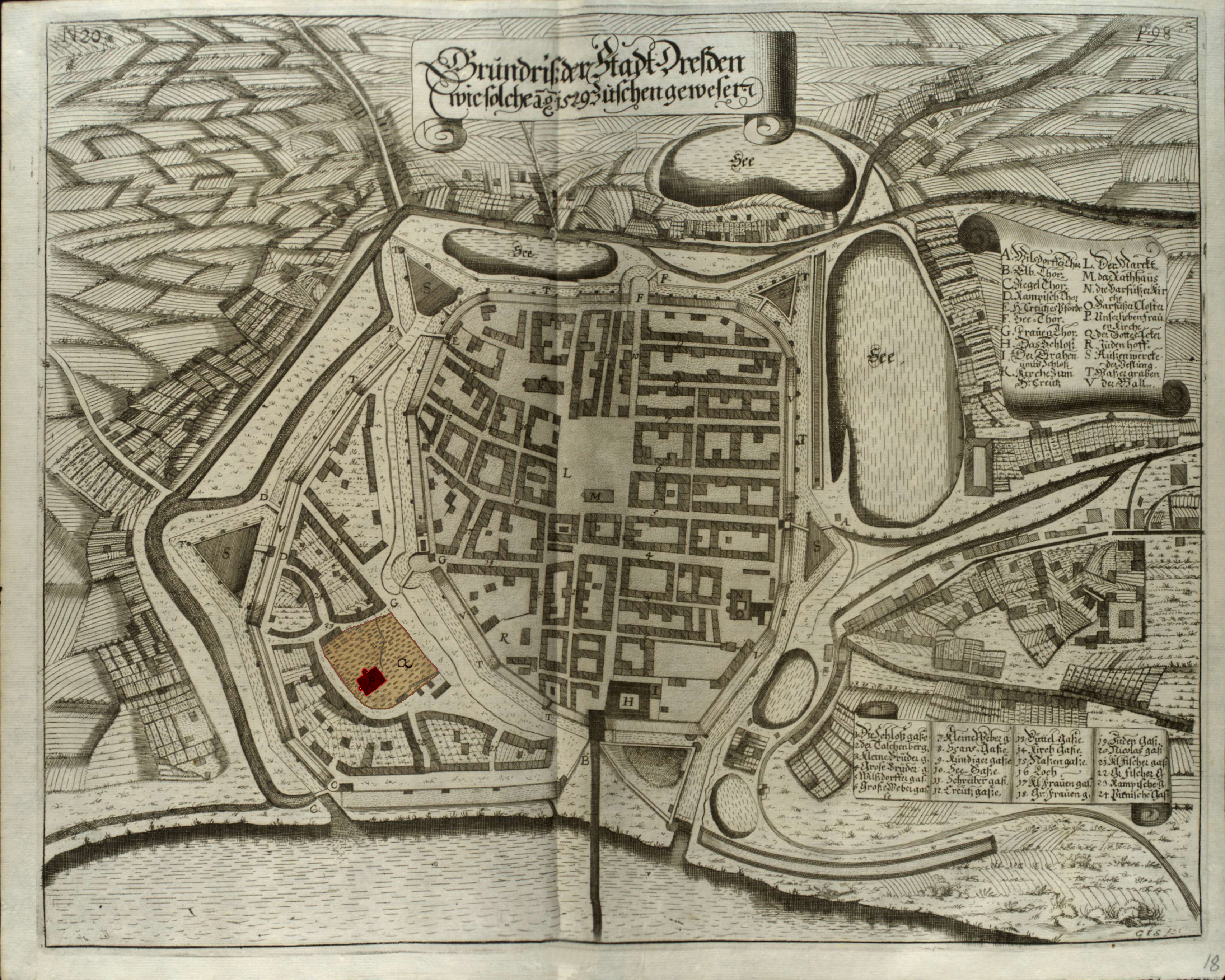 Anton Weck: Grundriss der Stadt Dresden 1529, Pano, pund Q eingefärbt